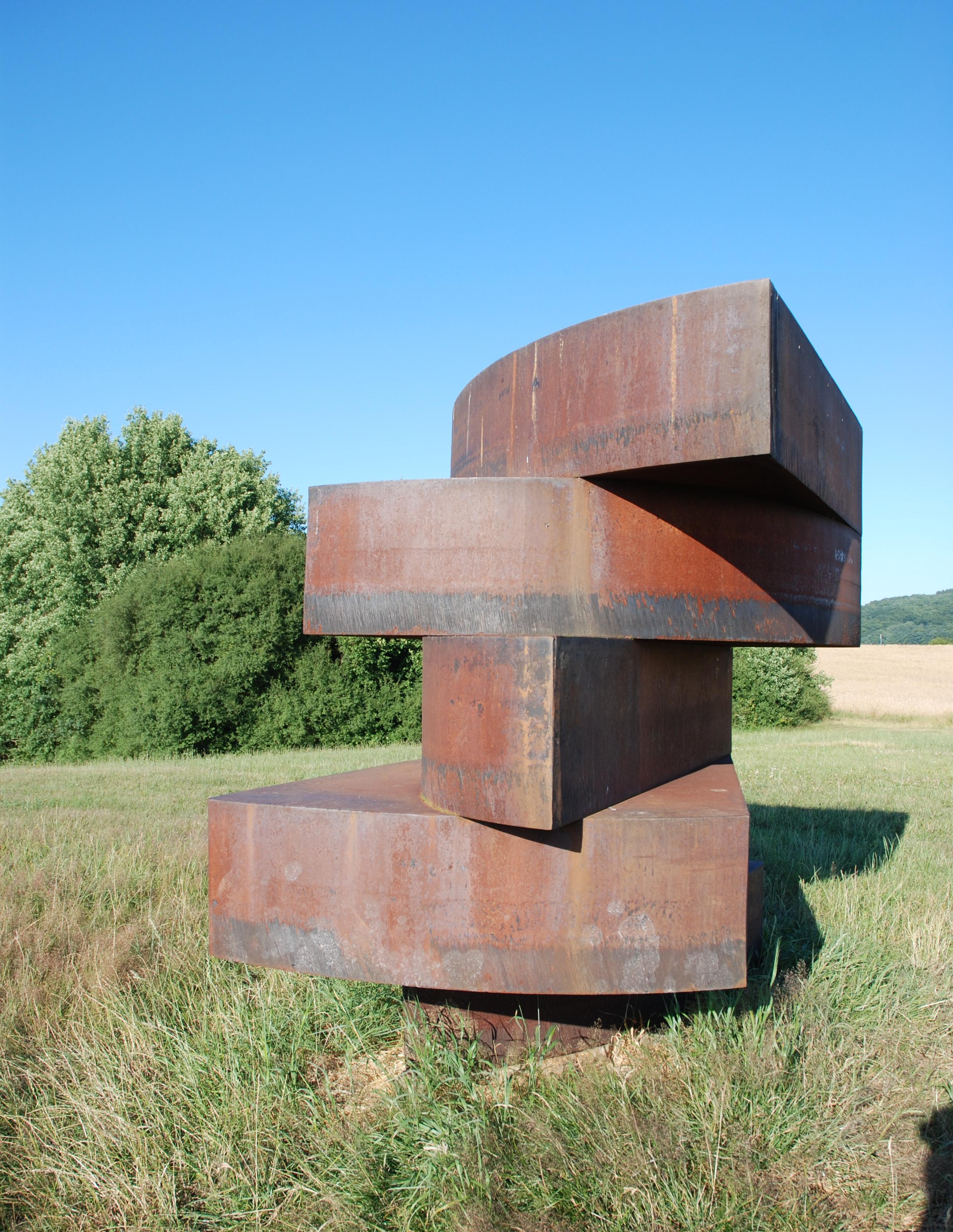 Skulptur 'ohne Titel, for Leo' von James Reineking. Material: Stahlblech, Aufstellungsjahr 1996, Aufstellungsort: bei St. Wendel